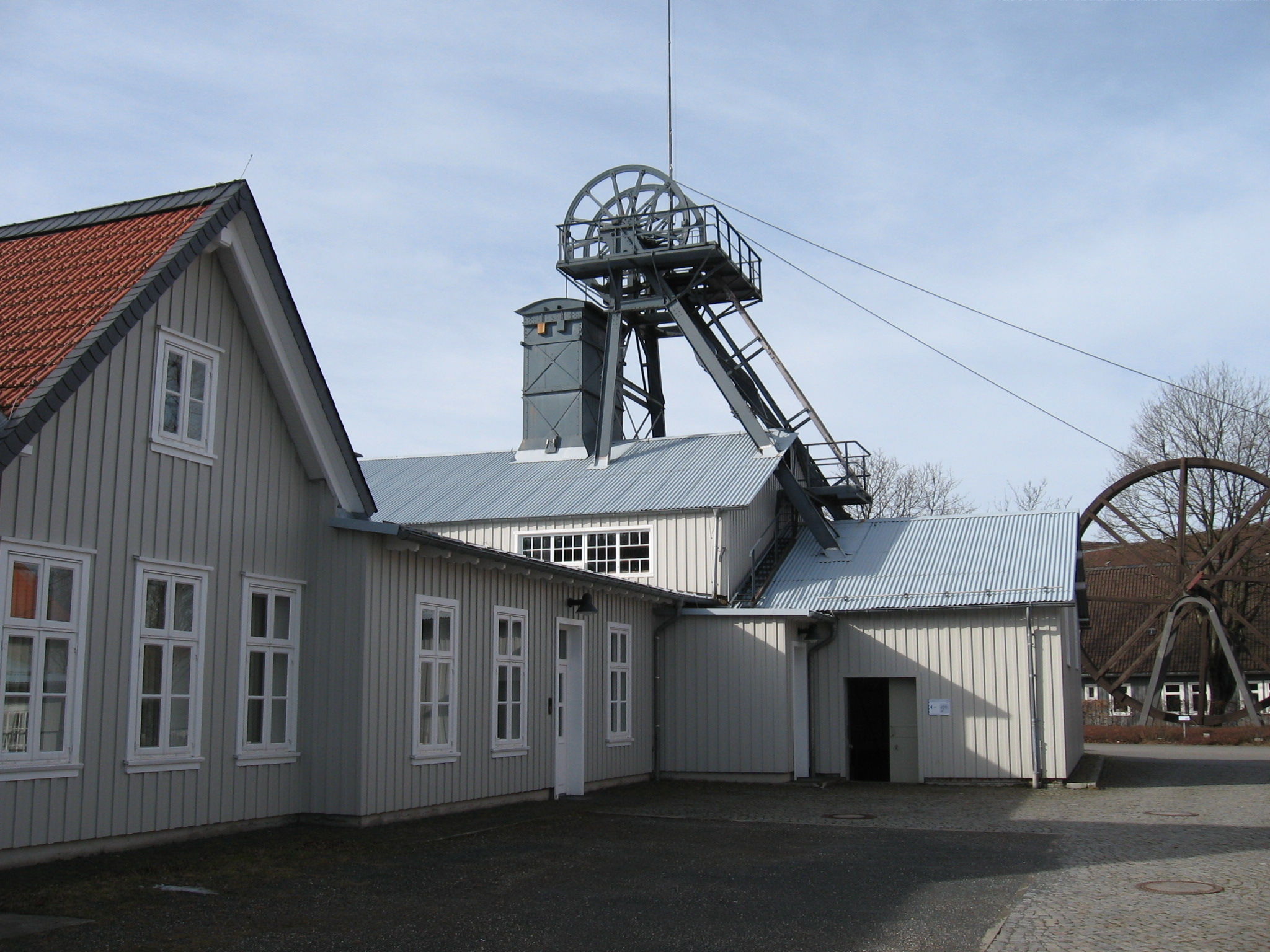 Kaiser-Wilhelm-Schacht (Clausthal) in Clausthal-Zellerfeld.